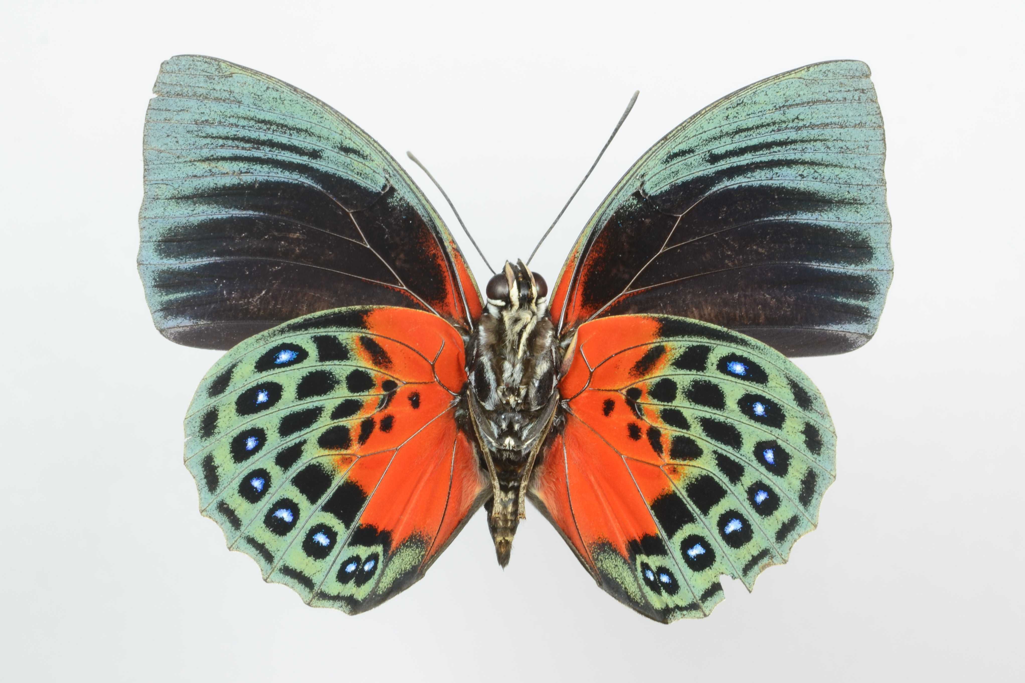 Agrias hewitsonius ventral Yaupi, Morona Santiago Prov., Ecuador